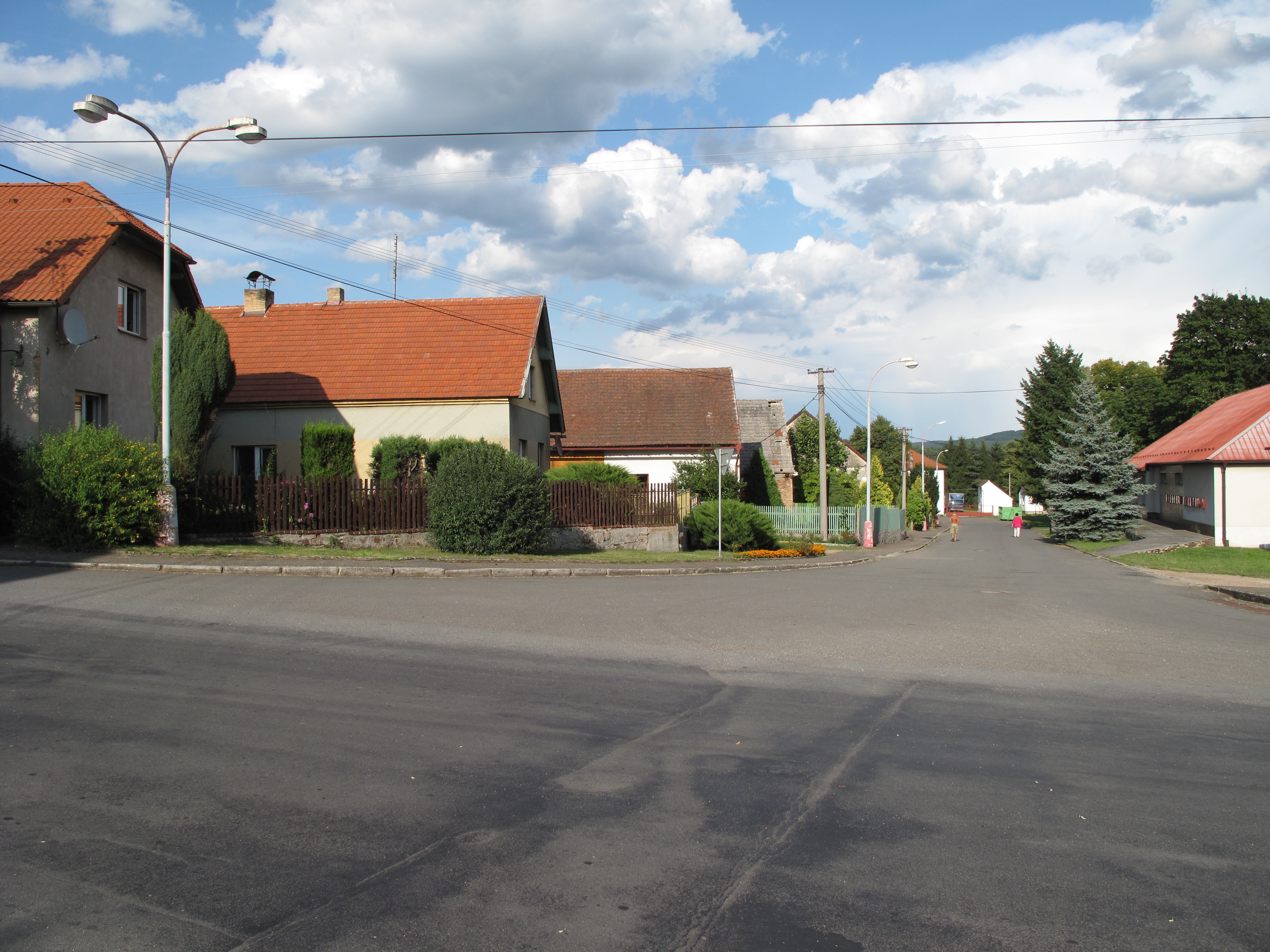 Domy na návsi v Mlečicích. Okres Rokycany, Česká republika.